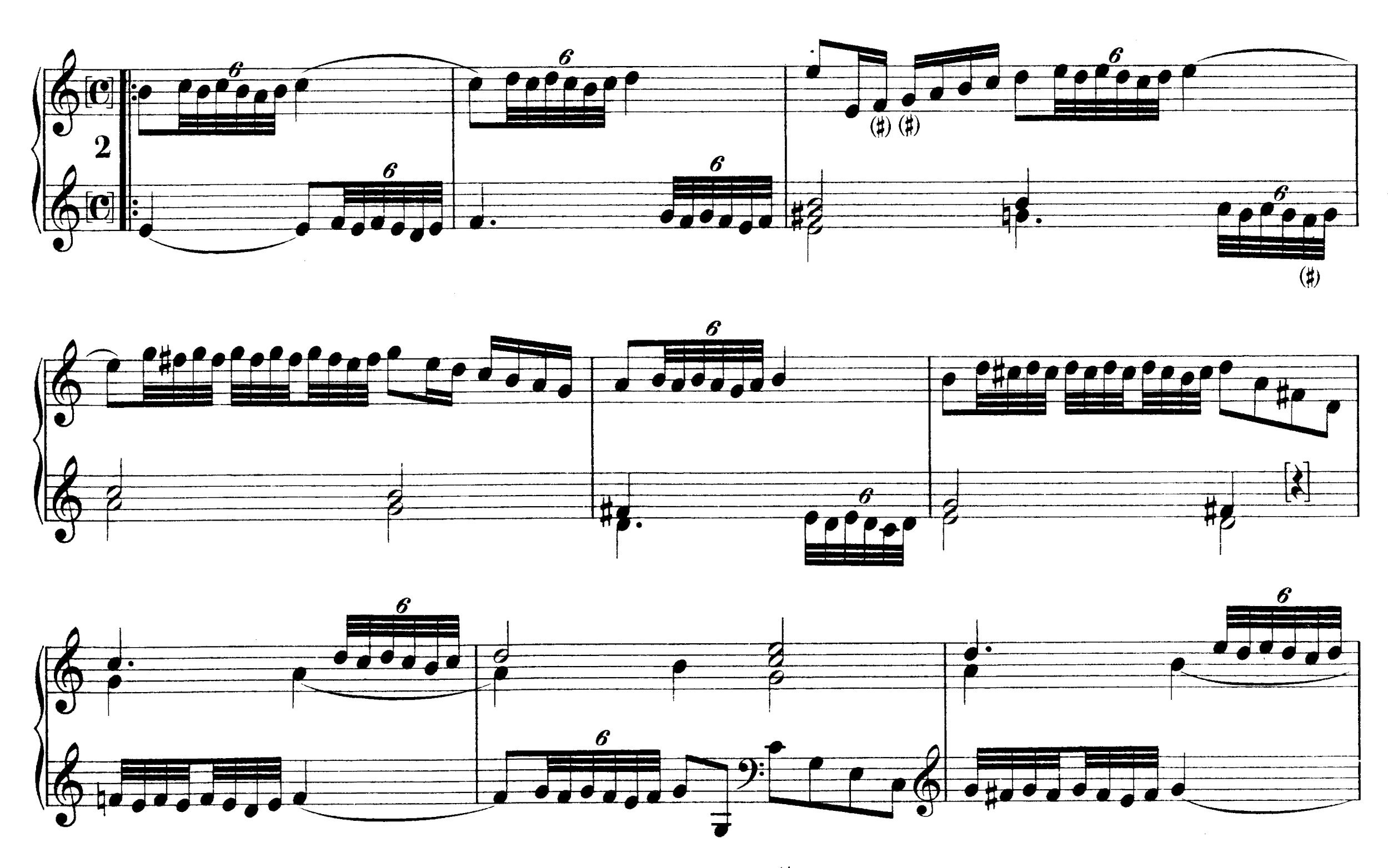 Thomas Tomkins, "The hunting Galliard" (detail), from the Fitzwilliam Virginal Book.